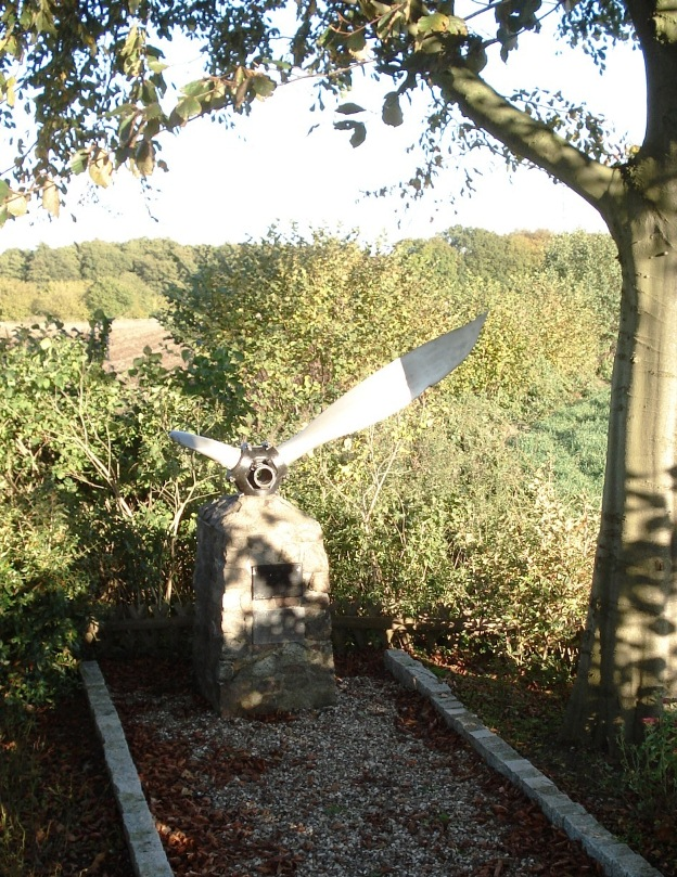 Gedenkstaette Vossberg - Sockel